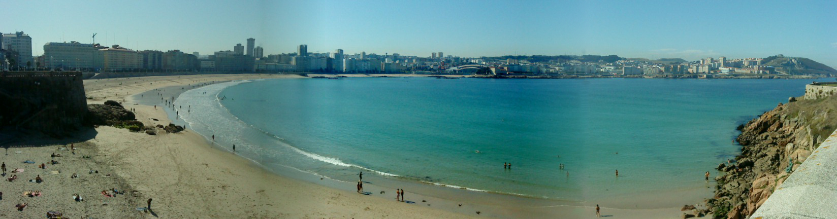 Vista panorámica de la Ensenada del Orzan, La Coruña, España.